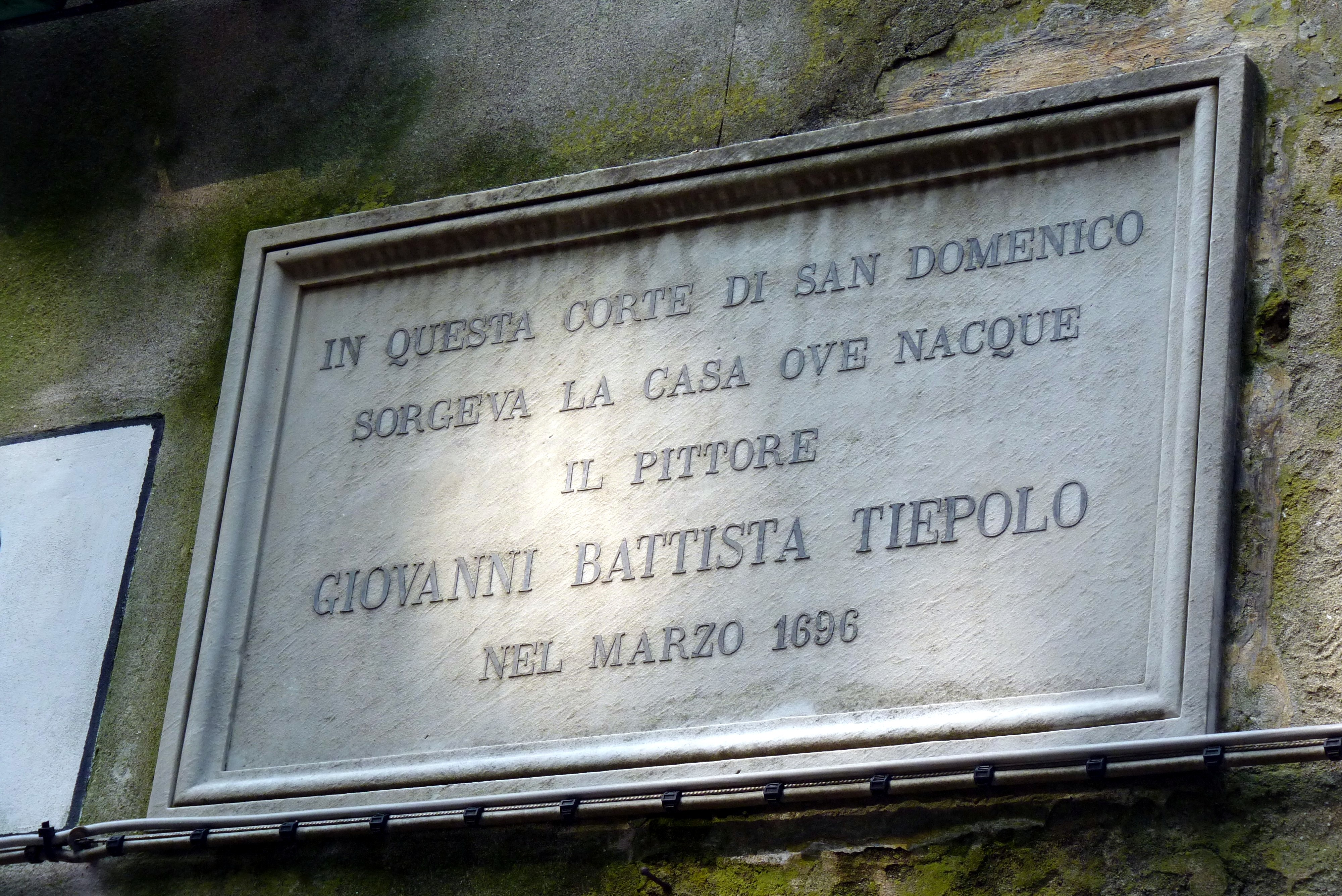 Plaque commemorative call san Domenego dans Castello.